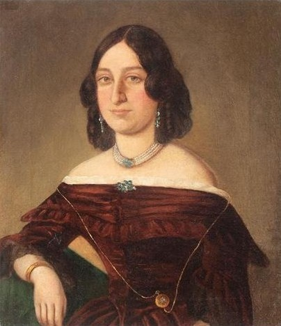 Смаранда Вогориде (1816—1885), жена Михаила Стурдза.